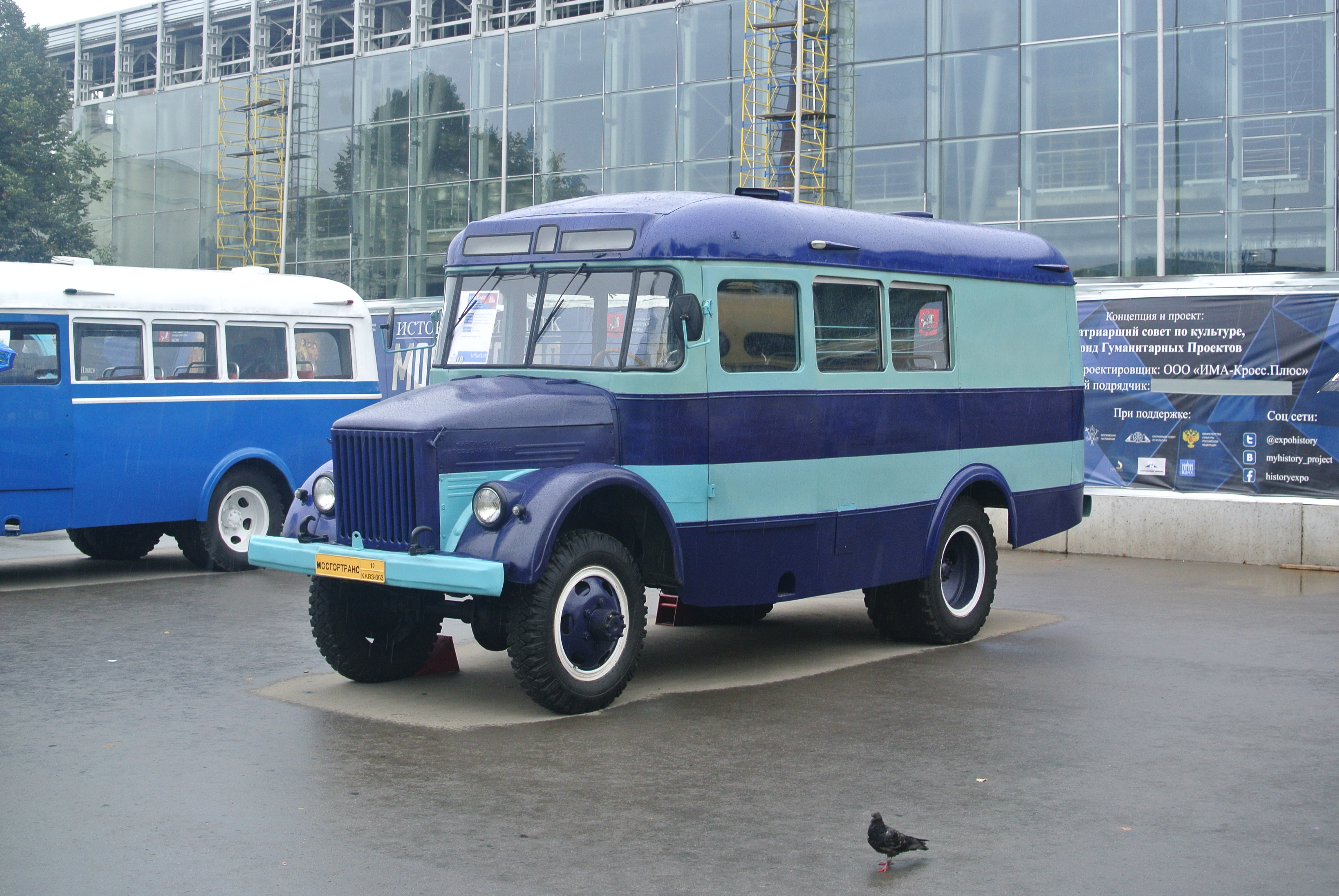 Автобус повышенной проходимости КаВЗ-663 на экспозиции Мосгортранса на ВВЦ